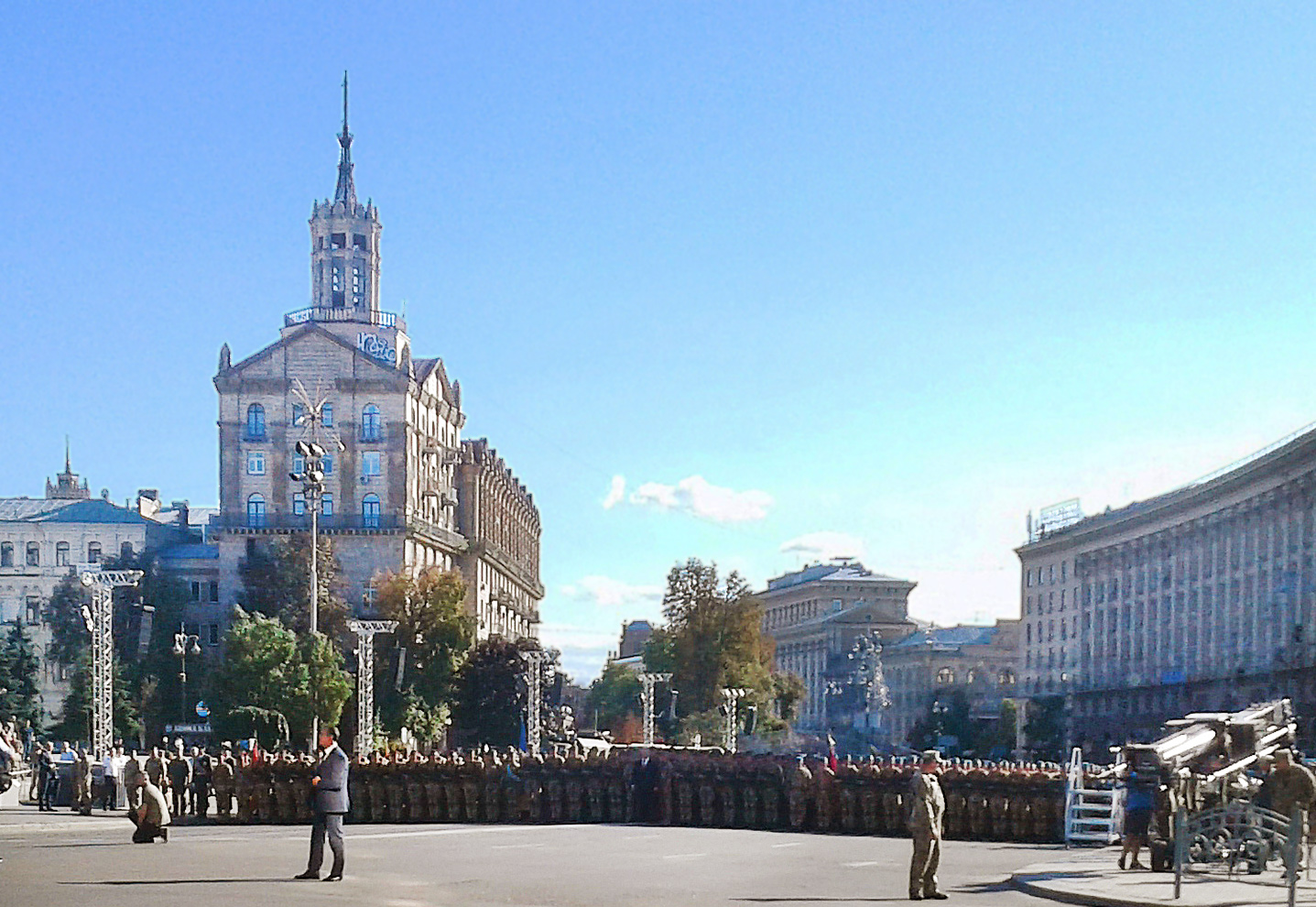 Репетиція параду на День Незалежності (2018). Президент П.Порошенко з учасниками параду. Майдан Незалежності